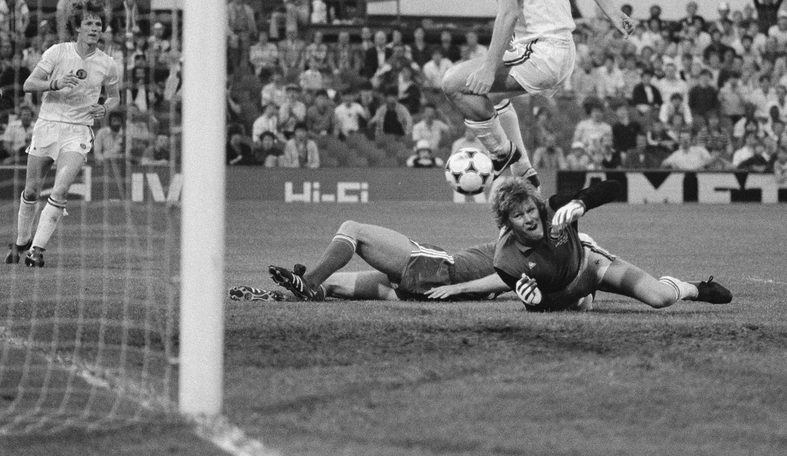 Collectie / Archief : Fotocollectie Anefo Reportage / Serie : [ onbekend ] Beschrijving : FC Bayern Munchen tegen Aston Villa 0-1 Europa Cup I Rummennige in aktie Datum : 26 mei 1982 Trefwoorden : sport, voetbal Persoonsnaam : Aston Villa, Fc Bayern Munchen Fotograaf : Antonisse, Marcel / Anefo Auteursrechthebbende : Nationaal Archief Materiaalsoort : Negatief (zwart/wit) Nummer archiefinventaris : bekijk toegang 2.24.01.05 Bestanddeelnummer : 934-7233